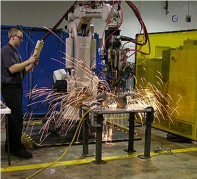 Imatge d'un robot que s'utilitza per a la soldadura per punts